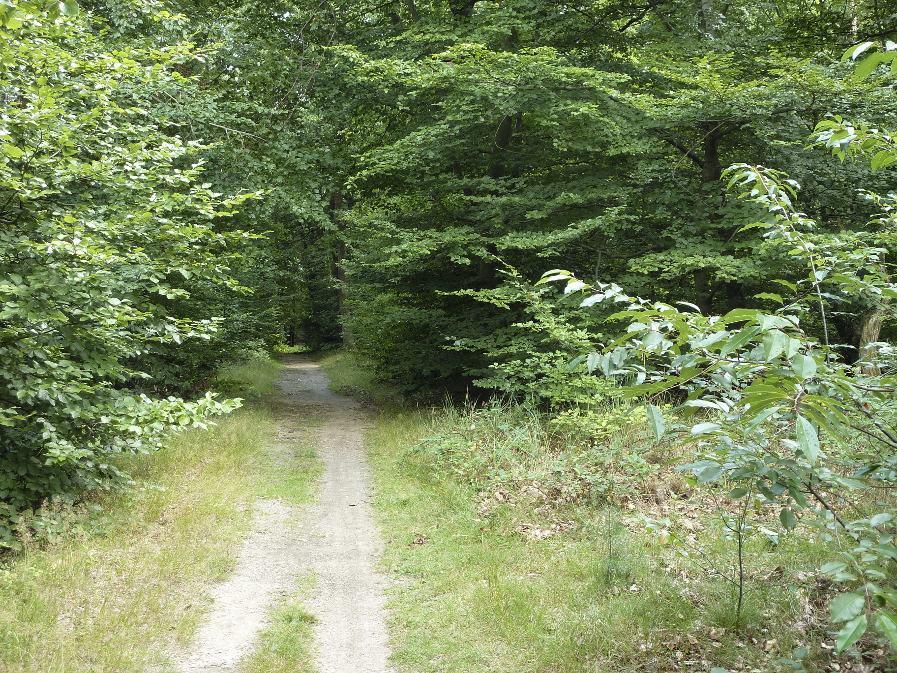 Frankfurt am Main, Bundesland Hessen: Die Kelsterbacher Terrasse ist eine acht Kilometer lange und bis zu 17 m hohe Geländestufe im Frankfurter Stadtwald. Die in west-östlicher Richtung verlaufende und nach Norden hin mäßig steil abfallende Terrasse ist eine Abbruchkante des Main-Urstromtals aus dem Erdzeitalter Pliozän. Sie beginnt im Westen am Mainufer in der Stadt Kelsterbach, durchläuft den Schwanheimer Wald und endet südlich des Frankfurter Stadtteils Niederrad. Das Foto zeigt eine Ansicht der auf der Oberkante der Terrasse verlaufenden Grenzschneise am Flurstück Hölle, Blick nach Osten